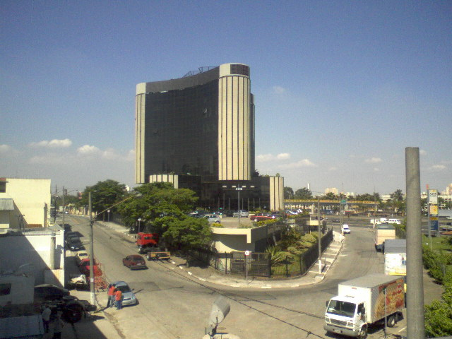 Palácio do Transporte Rodoviário de Cargas